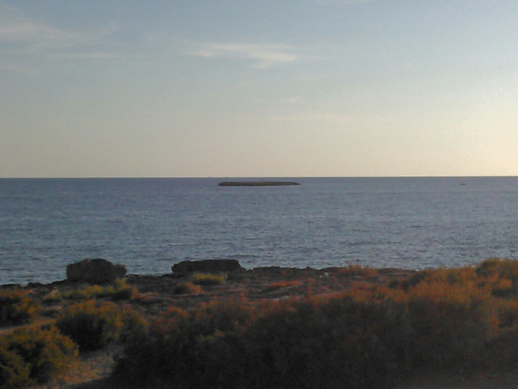 Illot de Na Corberana vist des de Cala Galiota.